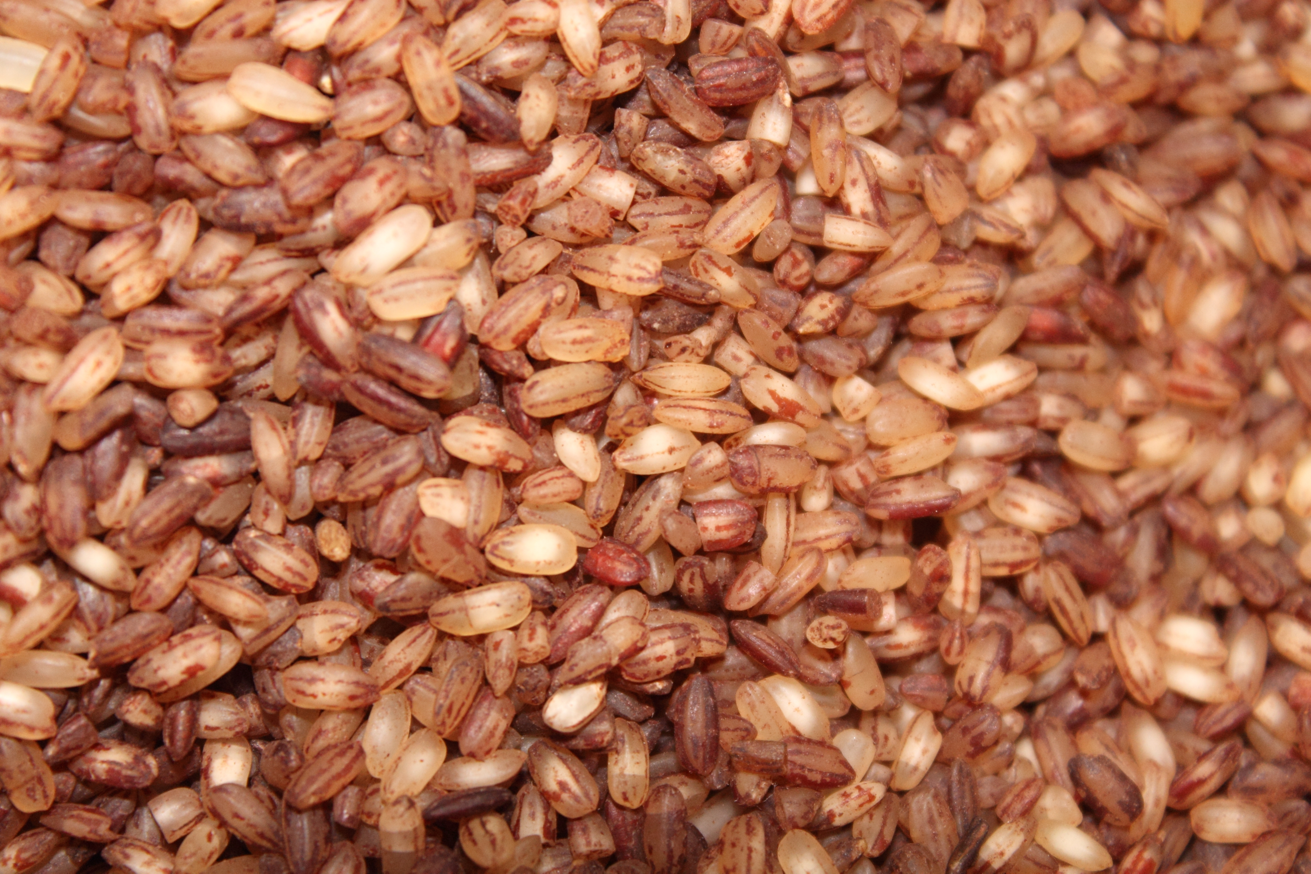 കേരളത്തിലേ തനതു അരികൾ